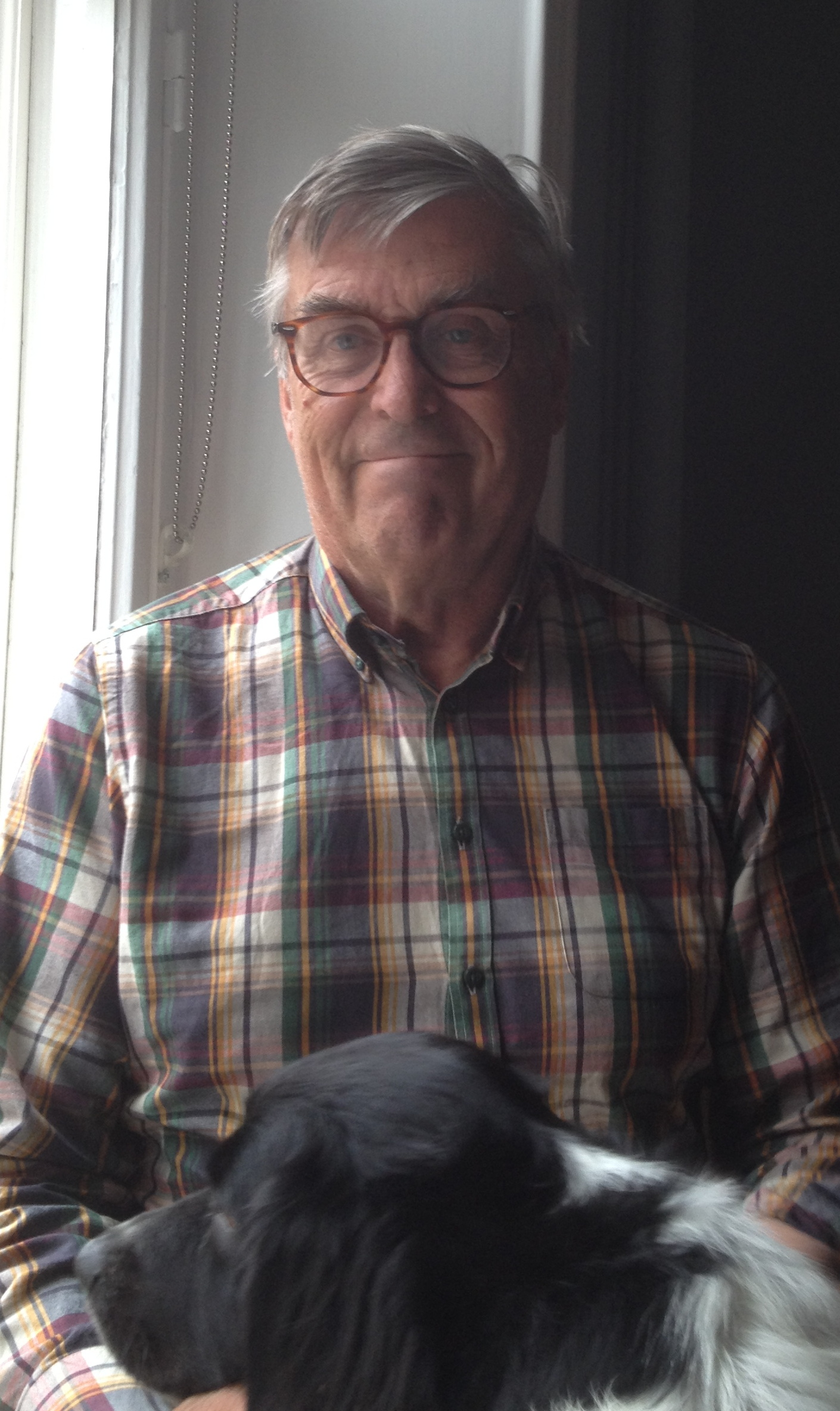 Svante Kjellberg. Fotograferad i hemmiljö 2019.